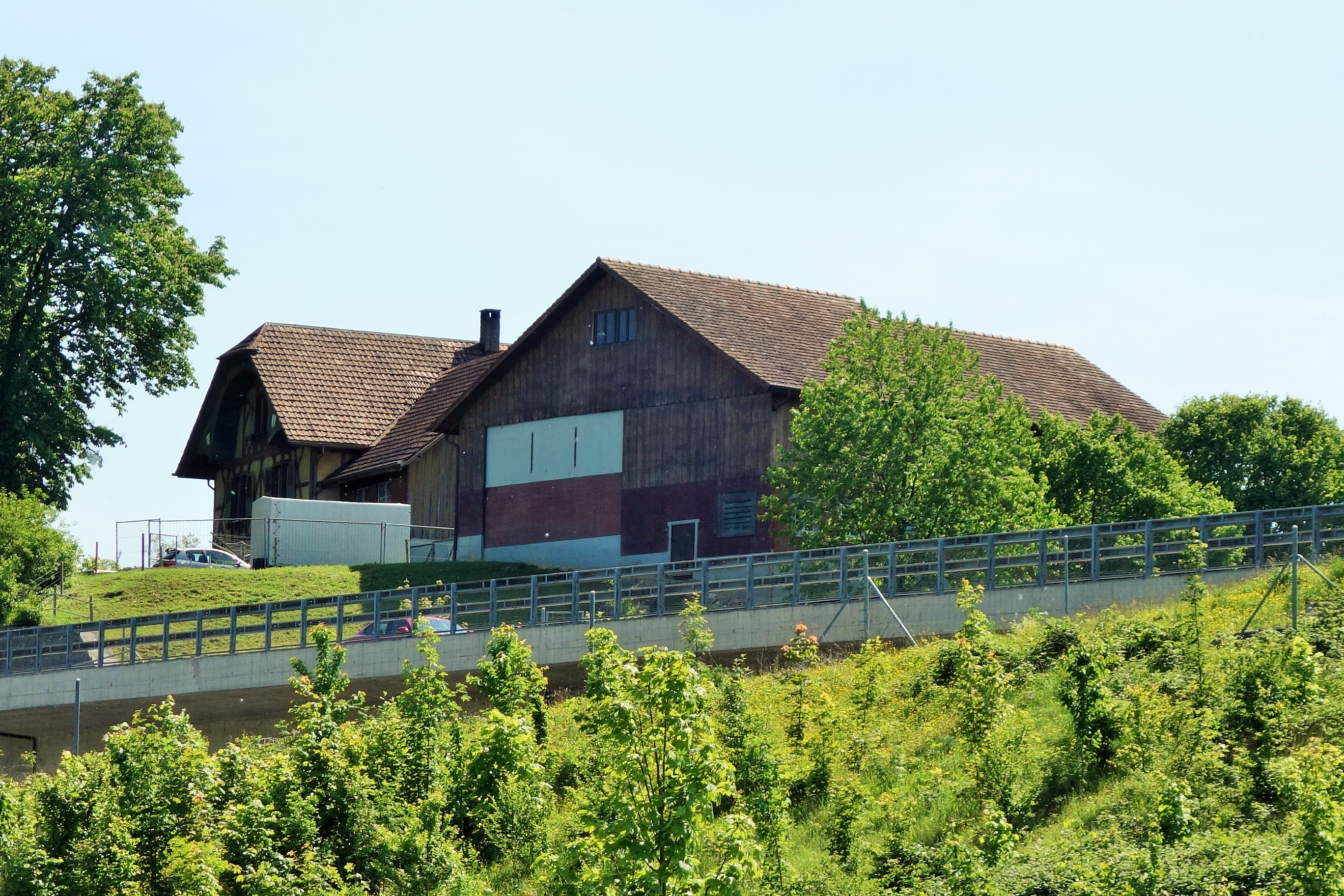 Sperrstelle Hülftenschanze, Frenkendorf BL, Schweiz